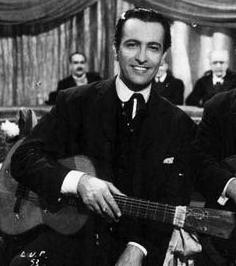 Hugo del Carril en la película El último payador (1950)